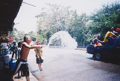 eigen foto songkran GNU FDL